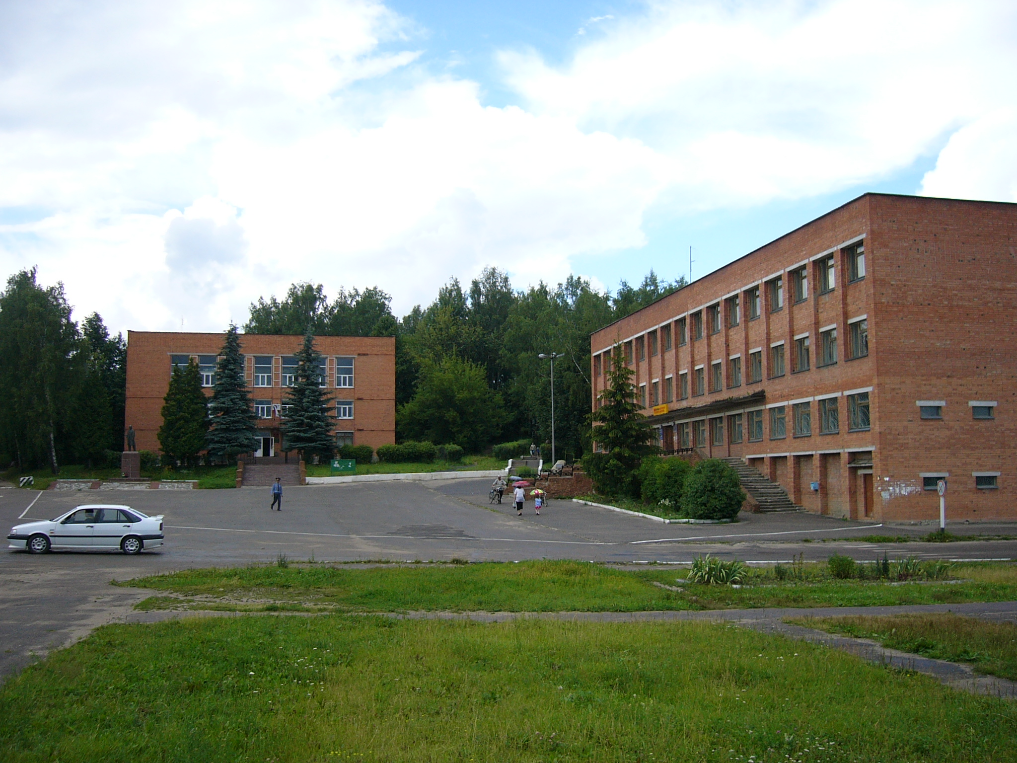 Центральная площадь п. Рогнедино, Брянская область, Россия